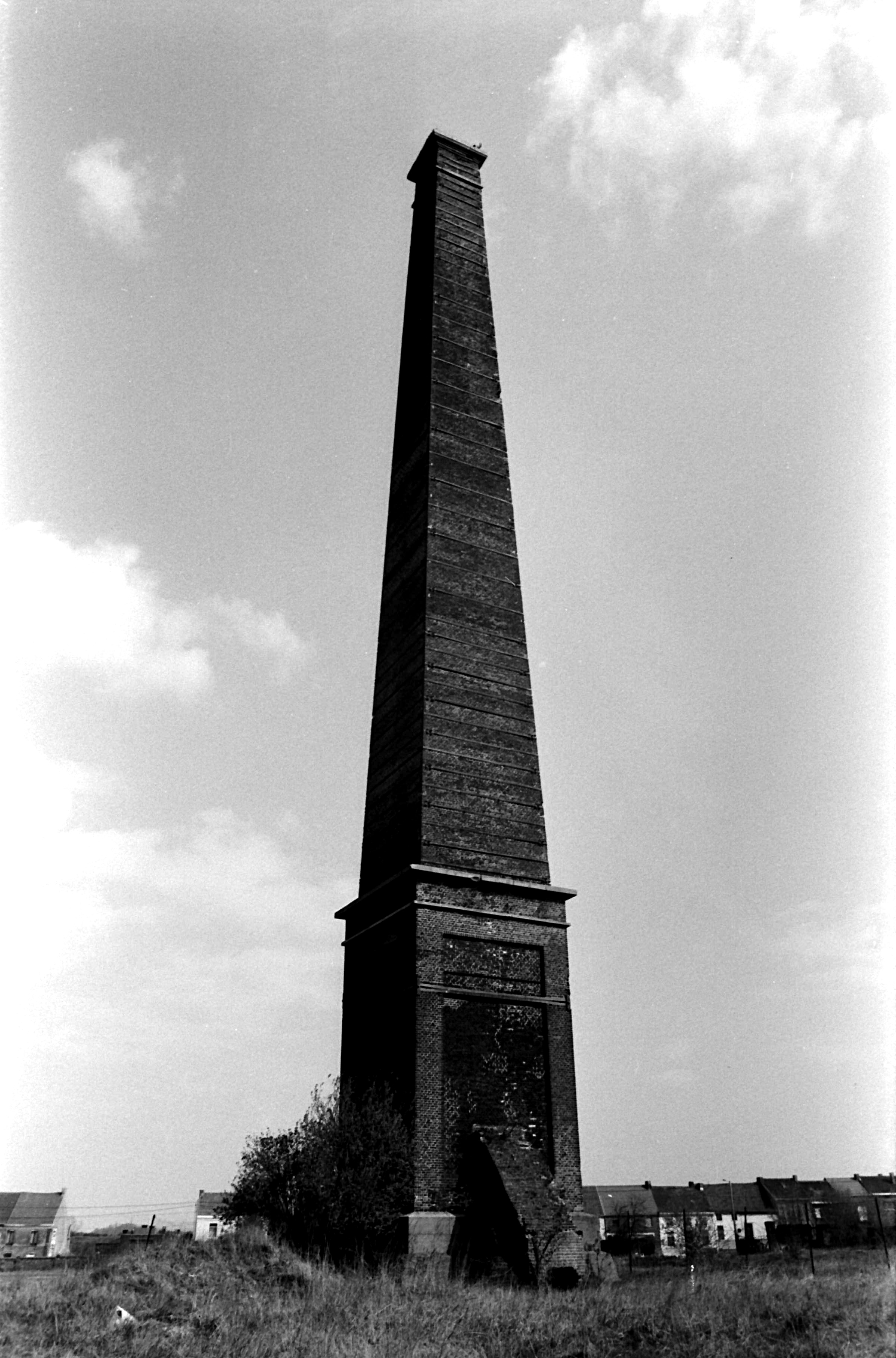 Le 13 avril 2006 à 16 heure 30 la cheminée de Boussu-Bois Vedette est dynamitée par l'école du Génie de Jambes. La cheminée mesurait 50 mètres de haut et l'épaisseur des murs à la base était de 1,5 mètre elle faisait partie intégrante de la centrale électrique de la mine.